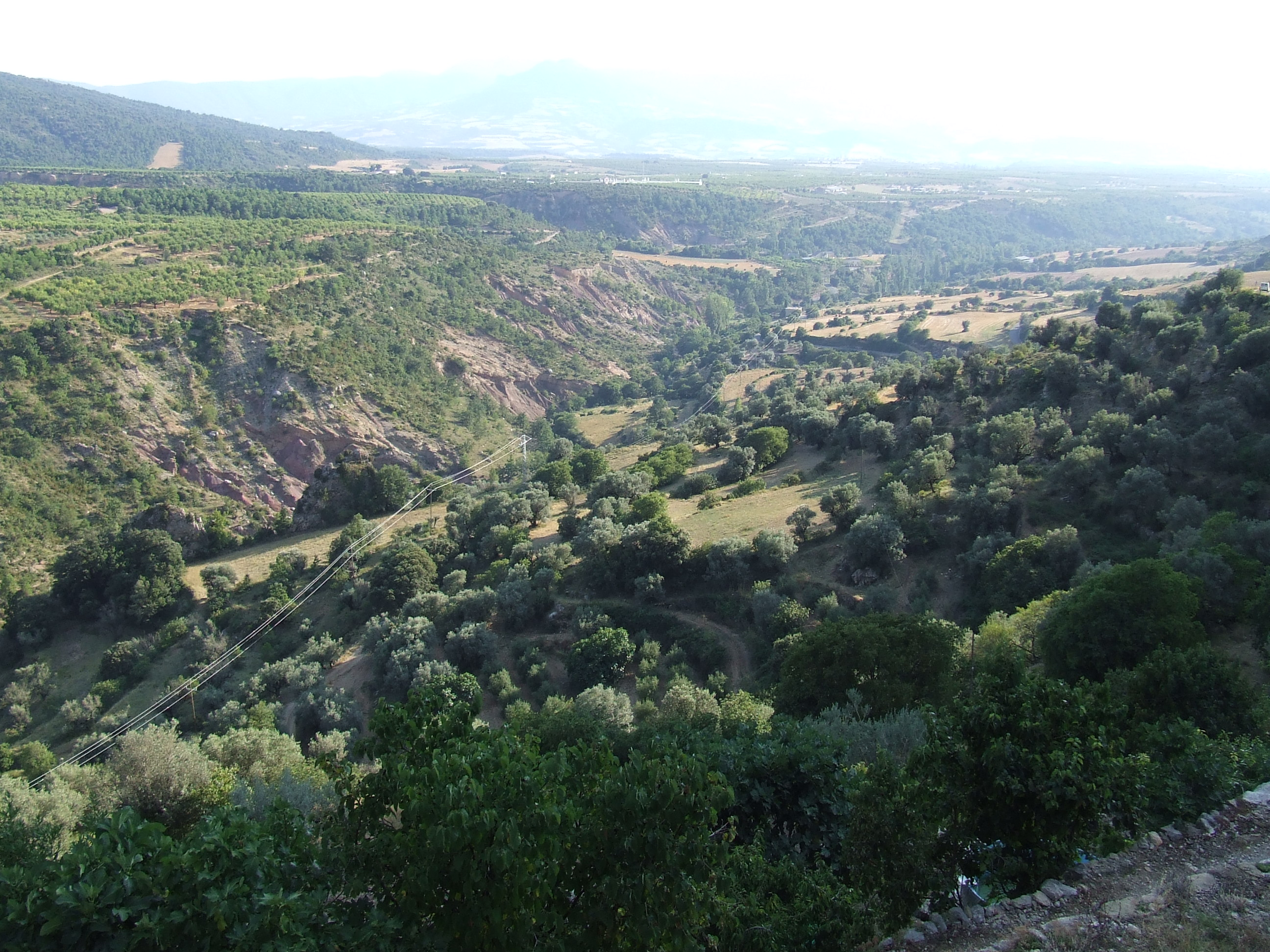 El Riu d'Abella als peus del poble del mateix nom.